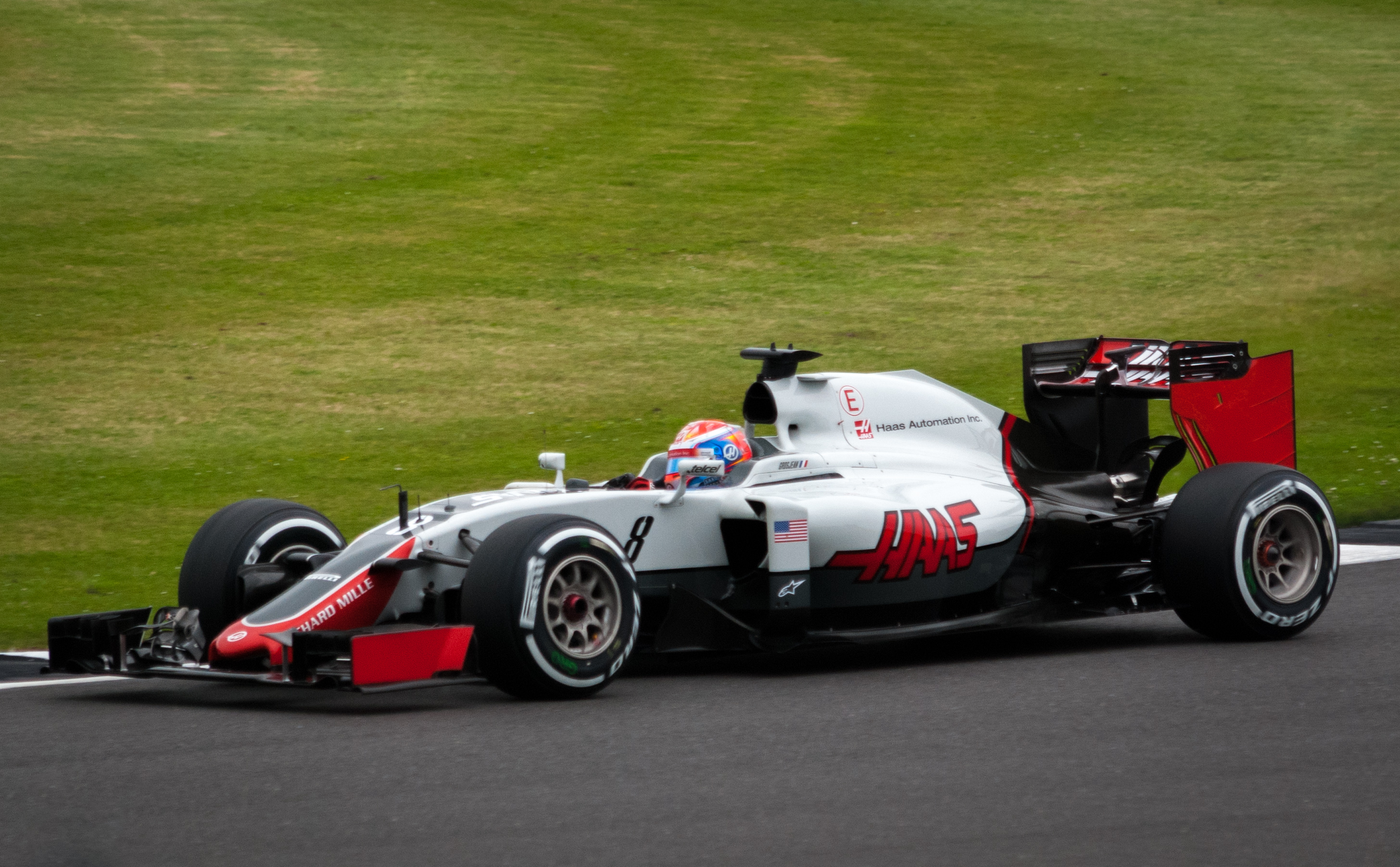 Romain Grosjean - Haas